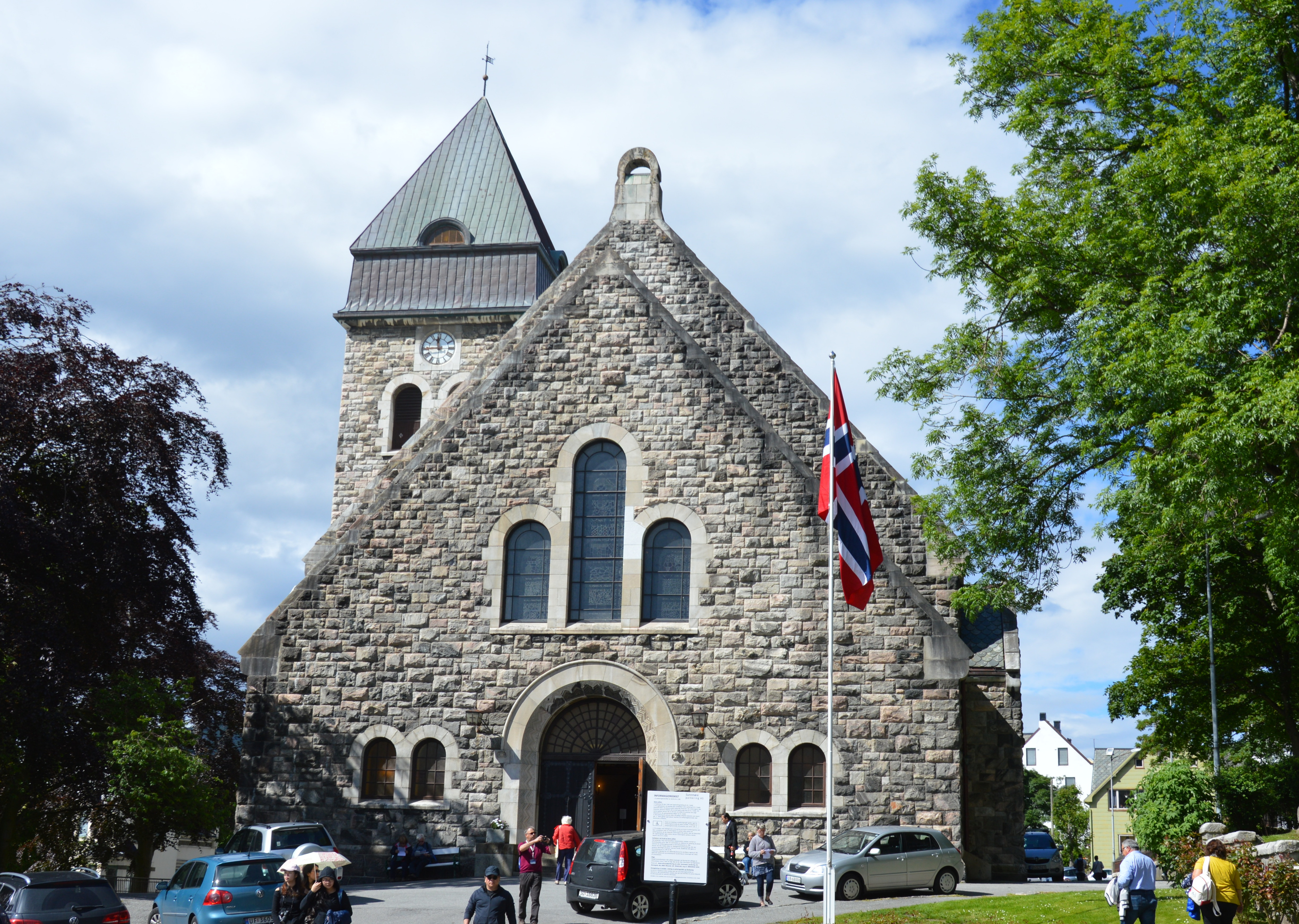 Kirche von Alesund